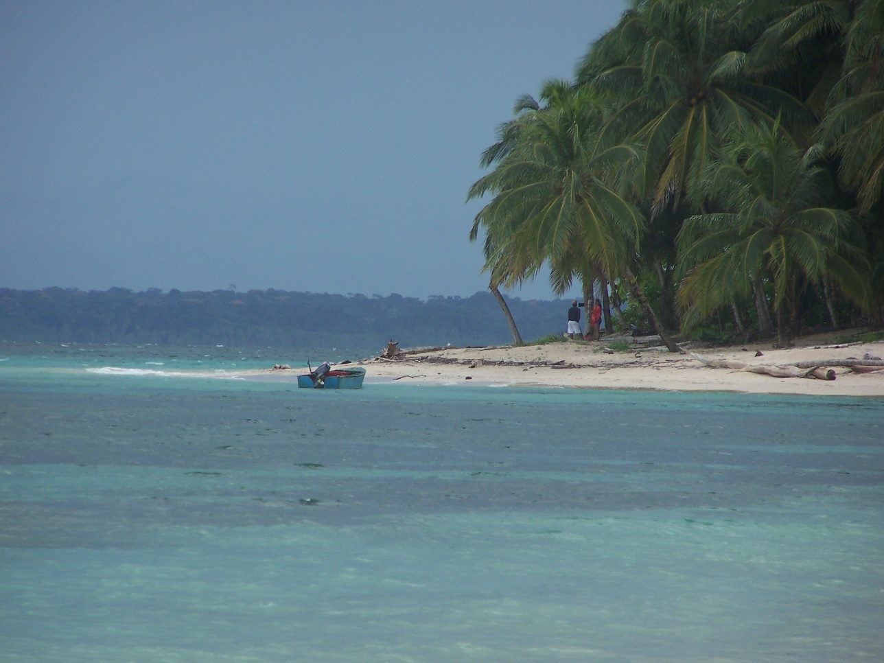 Cayo Zapatillas en Bocas del Toro